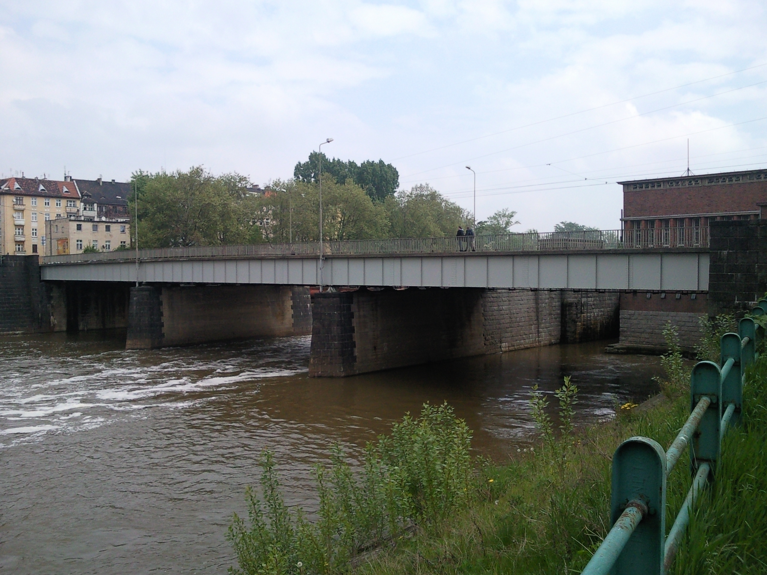 Wrocław - Most Pomorski